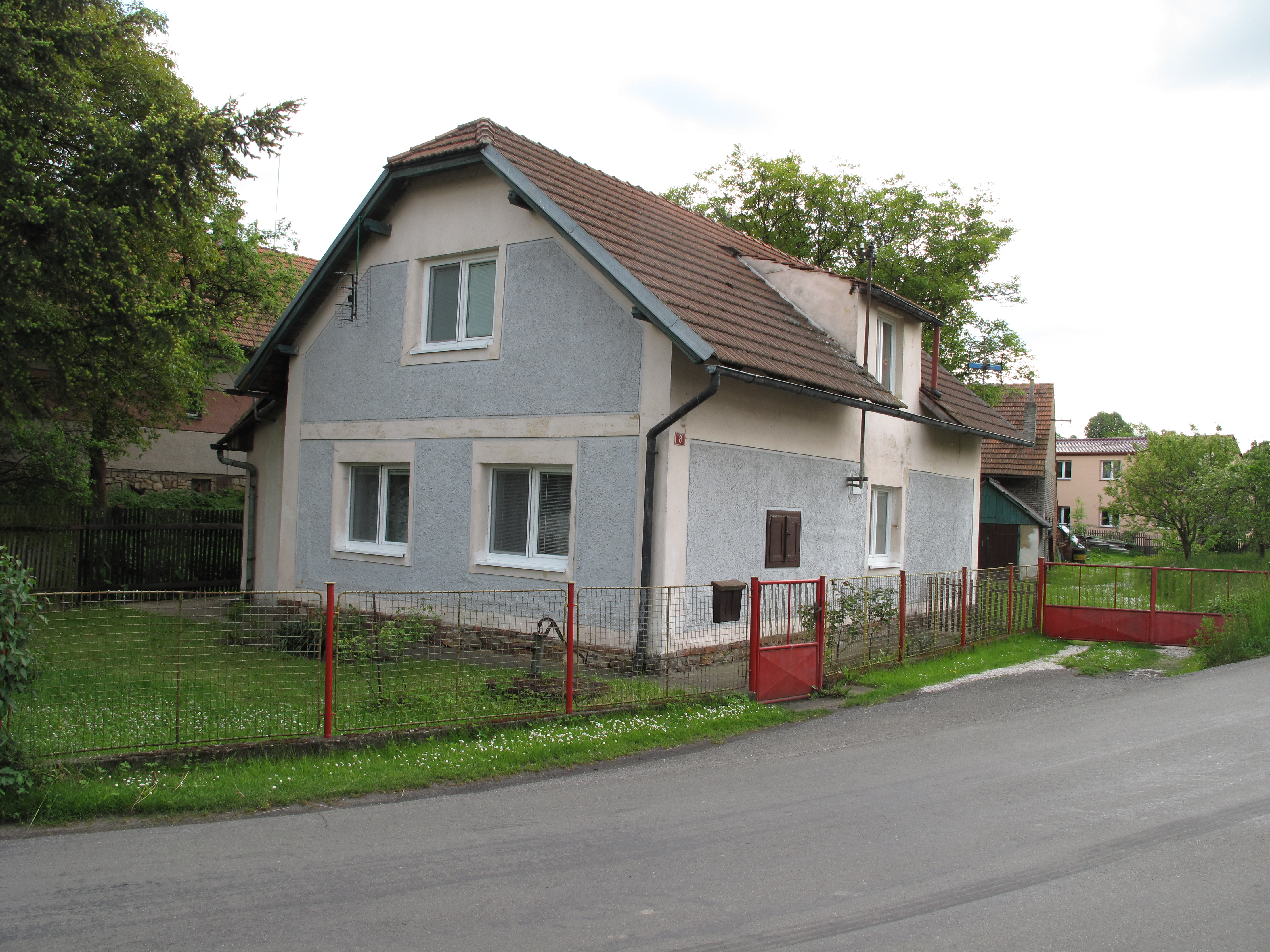 Dům v Osovci. Okres Beroun, Česká republika.